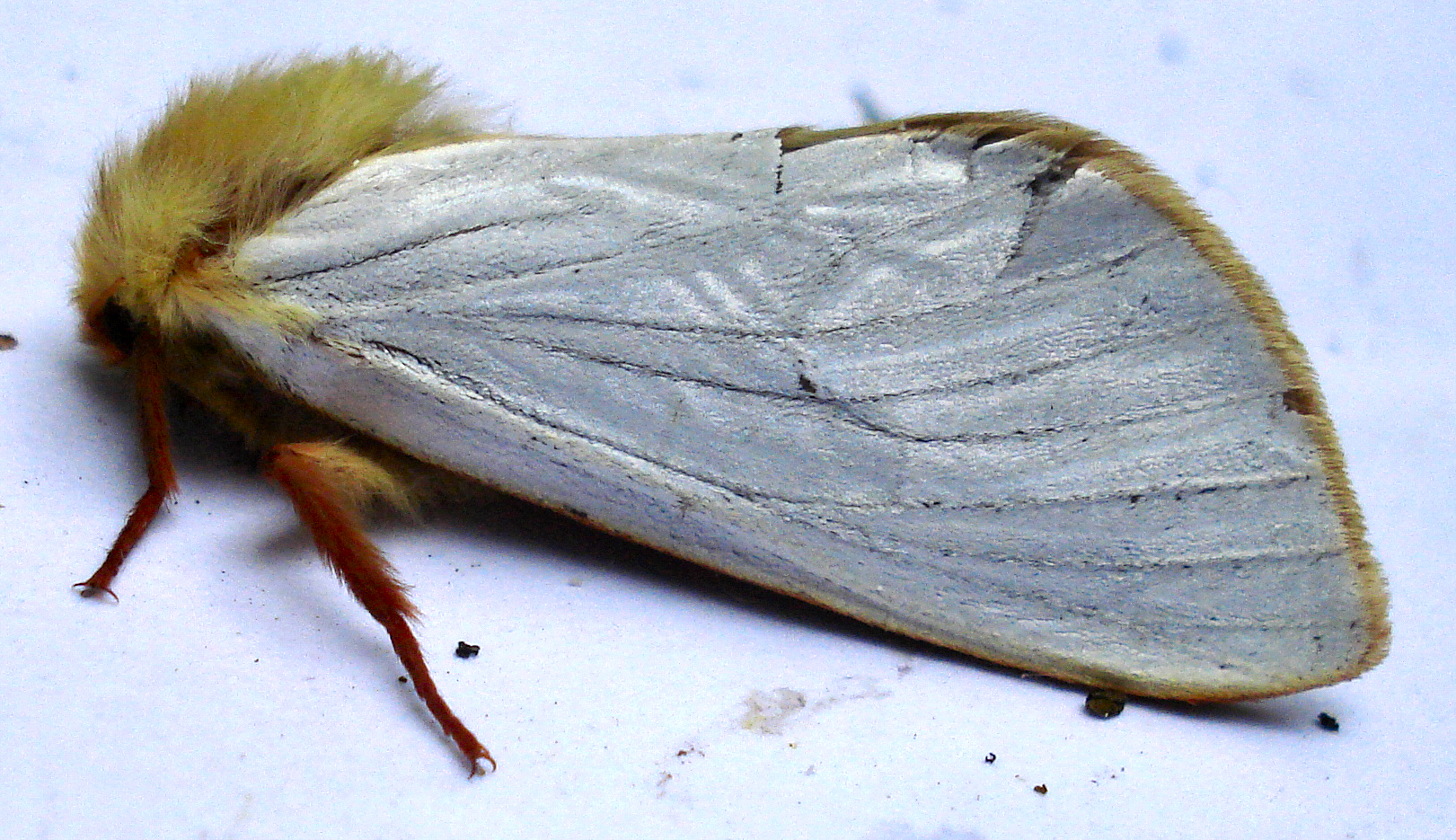 Hepialus humuli, male